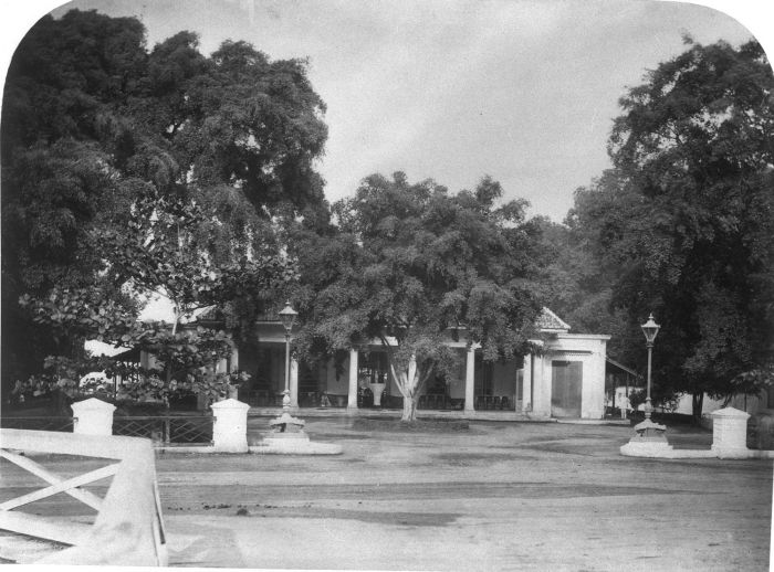 Foto. Het Marine Hotel in Batavia